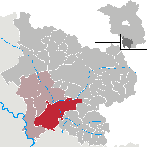 Bad Liebenwerda in Brandenburg (Country) - District Elbe-Elster